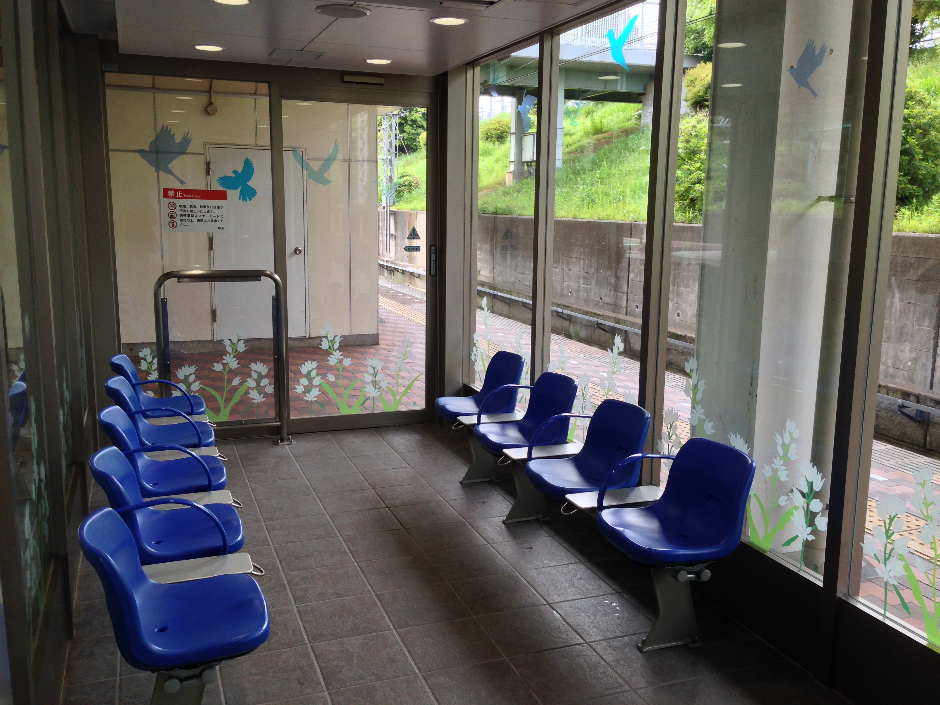 相鉄線の駅ホームに設置されている冷暖房完備の待合室（中）。いずみ野駅にて撮影、ブルーのイスは湘南台方面。